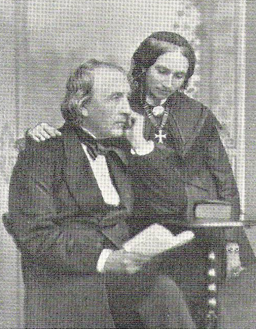 Den norsk digter Andreas Munch og hans kone Amalia Raben (født Nordberg)